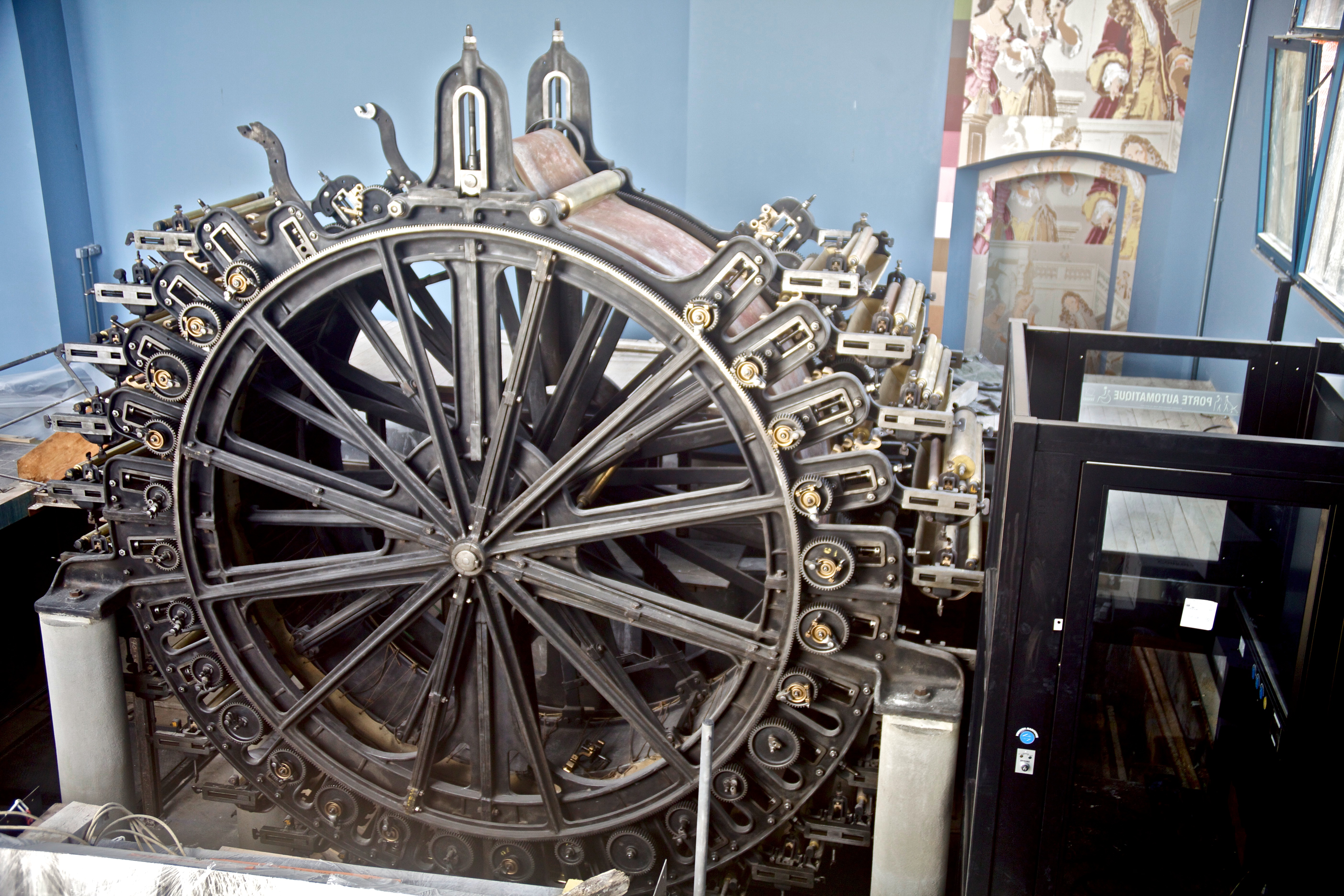 La machine aux 26 couleurs de Saint-Fargeau-Ponthierry : vue de haut .